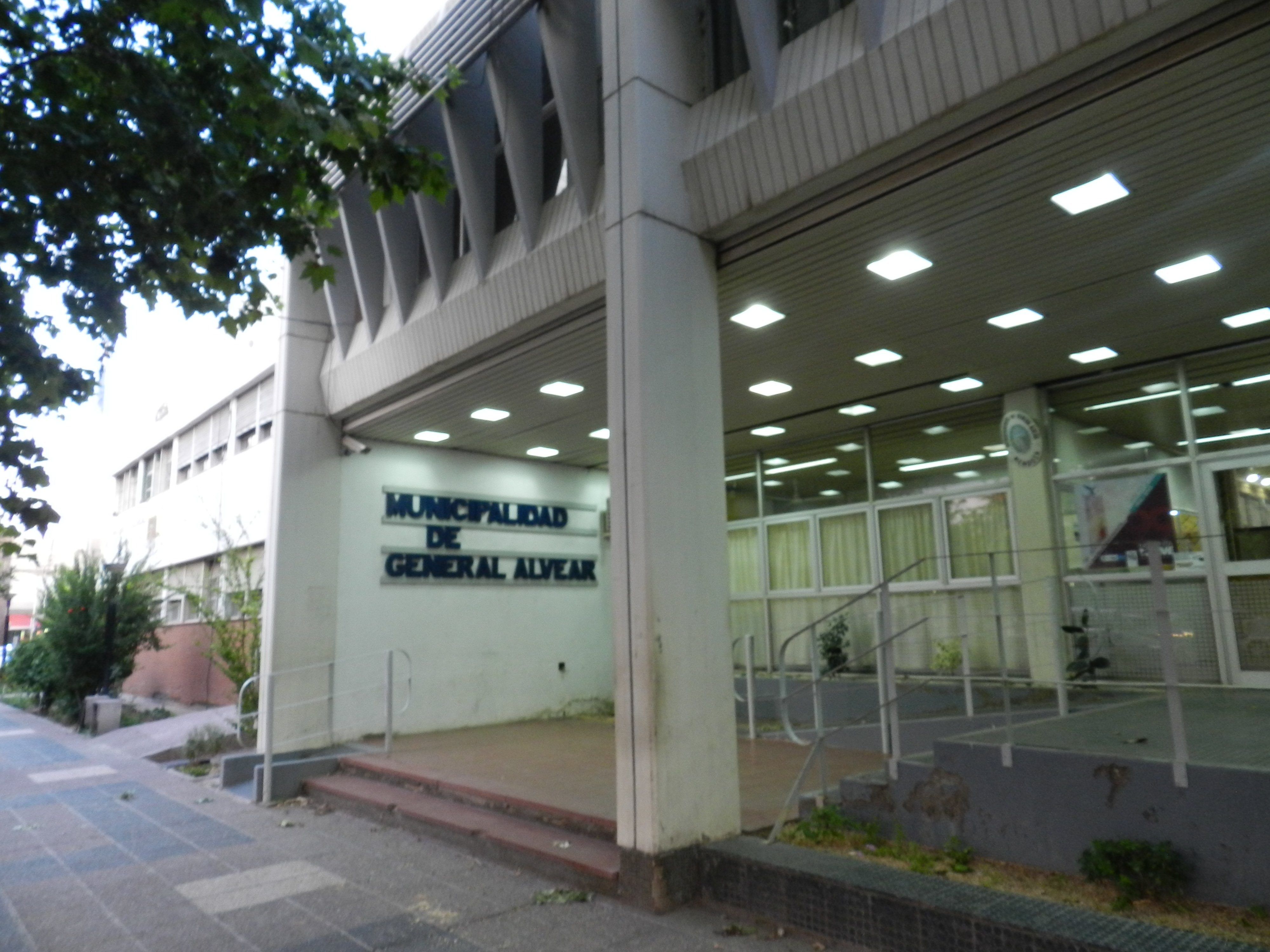 Edificio municipal de General Alvear, Provincia de Mendoza, Argentina